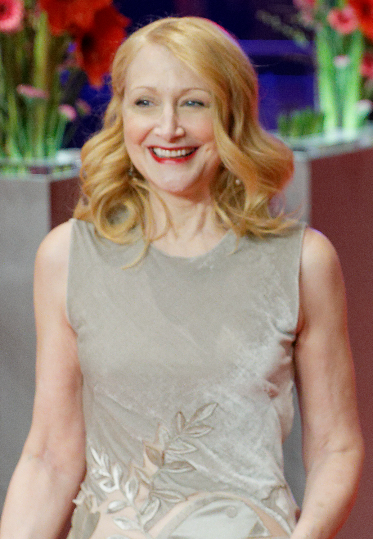 Patricia Clarkson und Sally Potter bei der Weltpremiere von The Party im Rahmen der Berlinale 2017